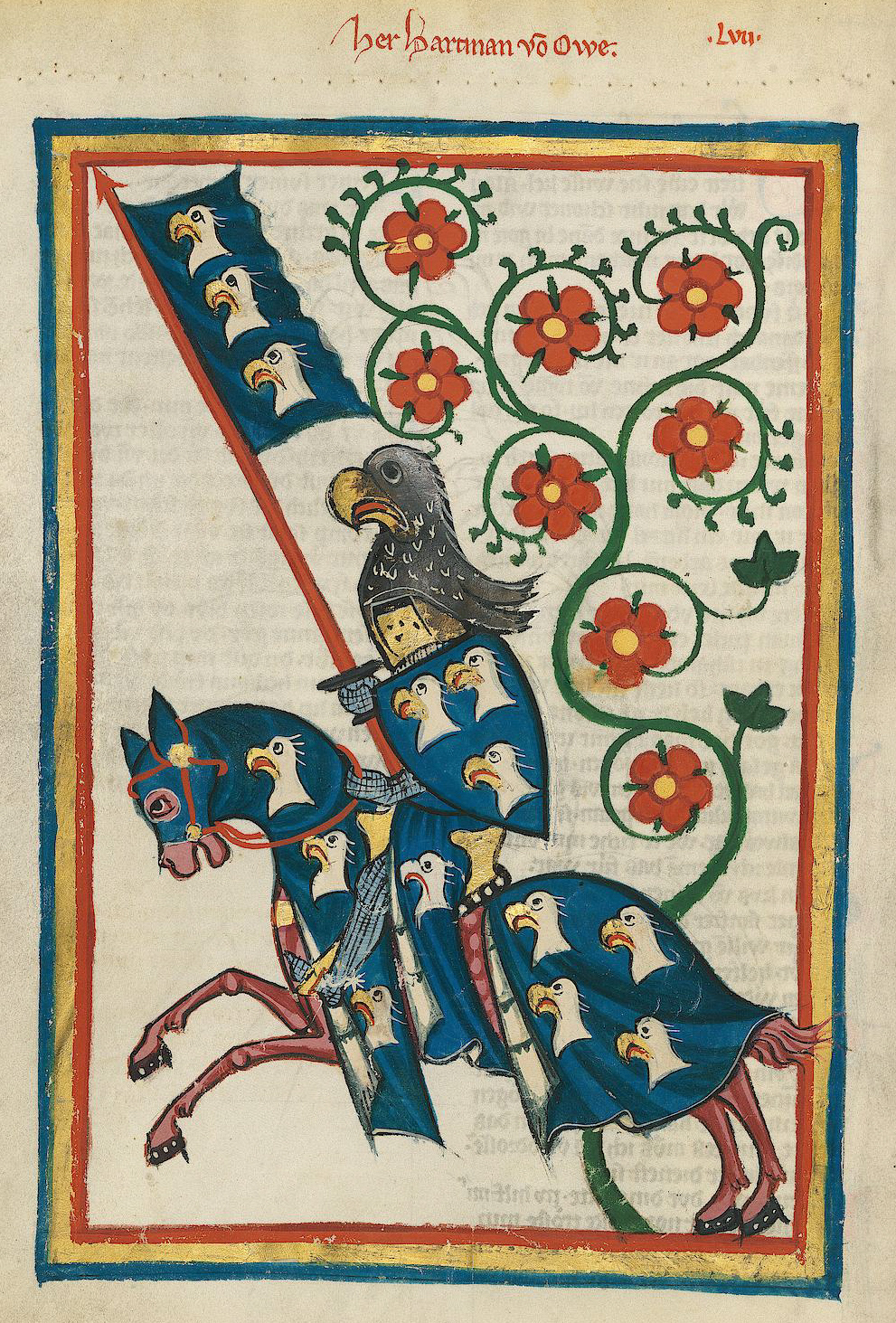 Codex Manesse, UB Heidelberg, Cod. Pal. germ. 848, fol. 184v, Herr Hartmann von Aue